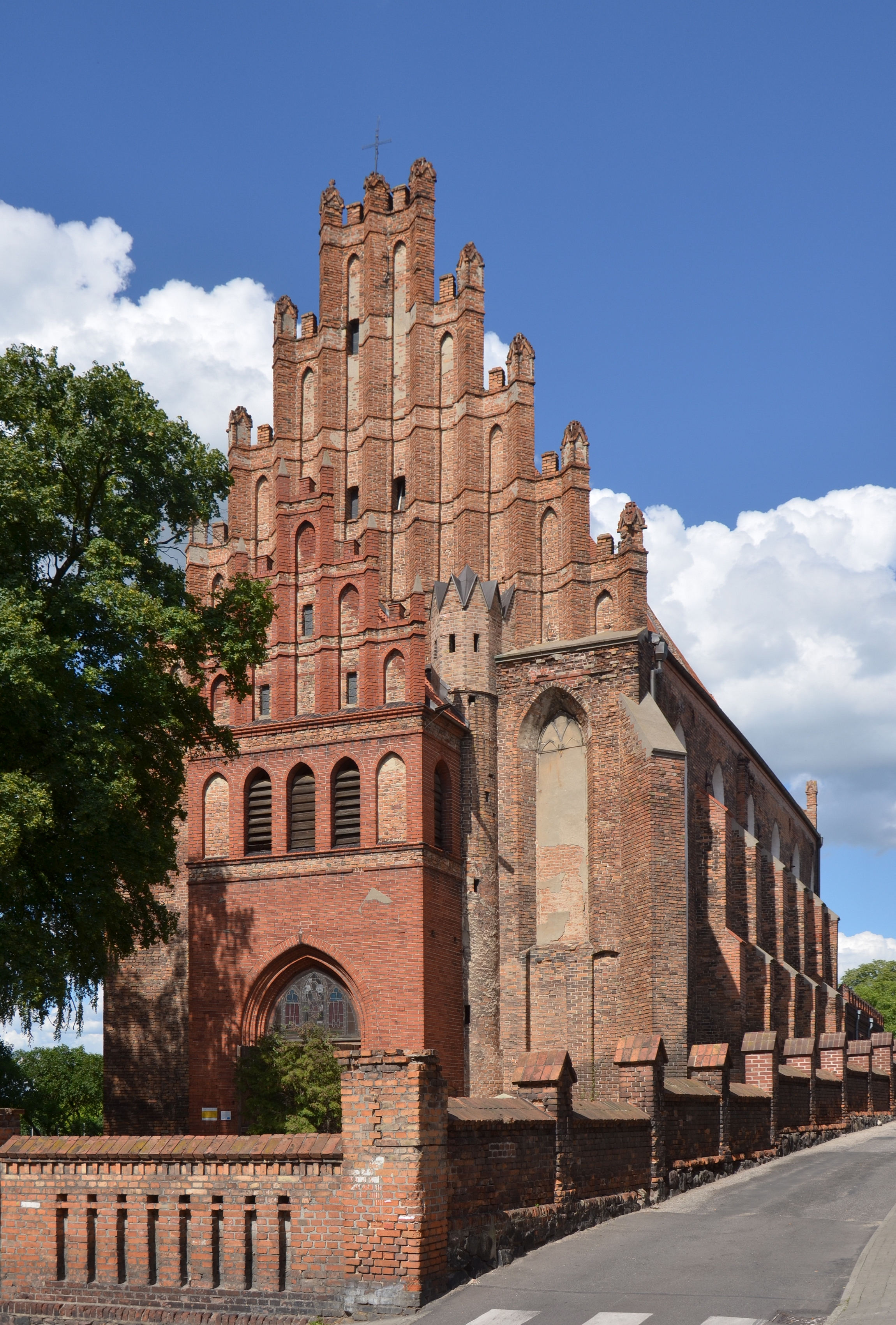 Chełmno, podominikański kościół św. Piotra i św. Pawła, fasada